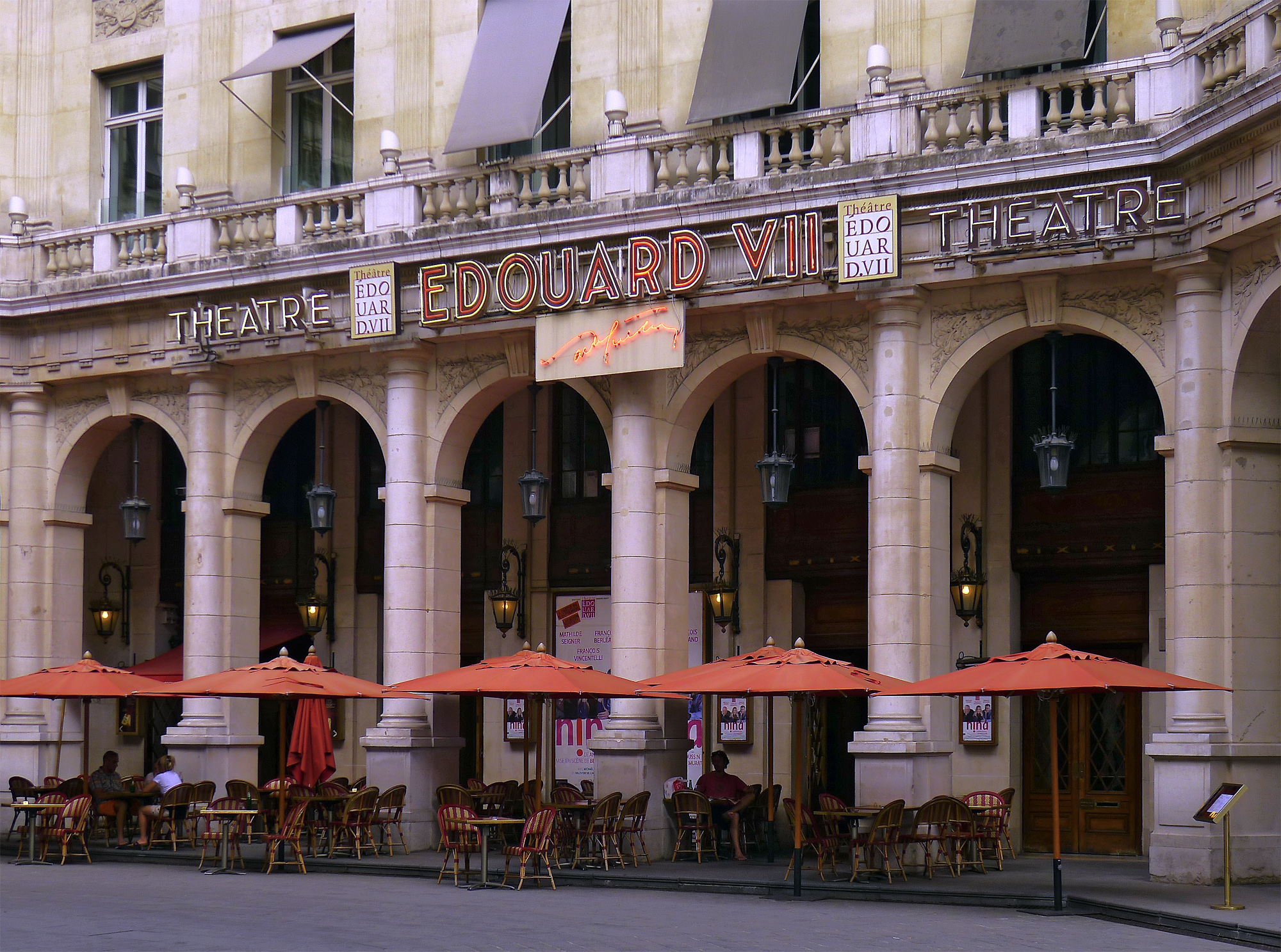 Théâtre Édouard VII et immeubles (Inscrit) - Place Edouard VII - Paris IX .